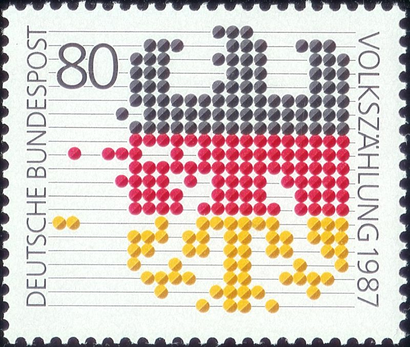 Recensement 1987 / Volkszählung 1987